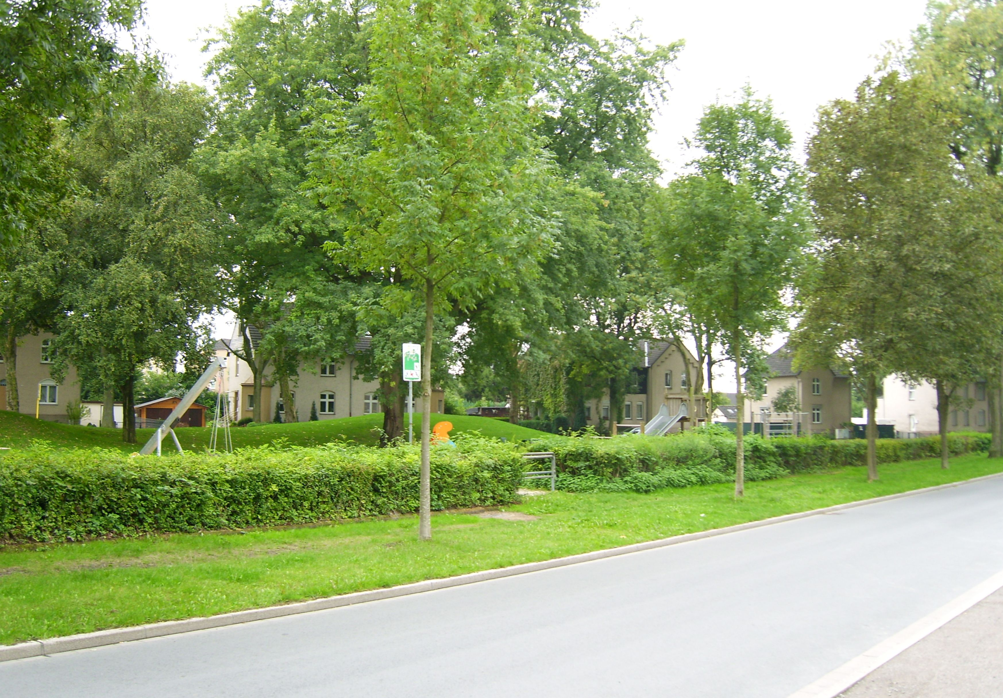 Zechenkolonie am Drissenplatz, Hinsberg im Recklinghäuser Ostviertel, erbaut um 1900